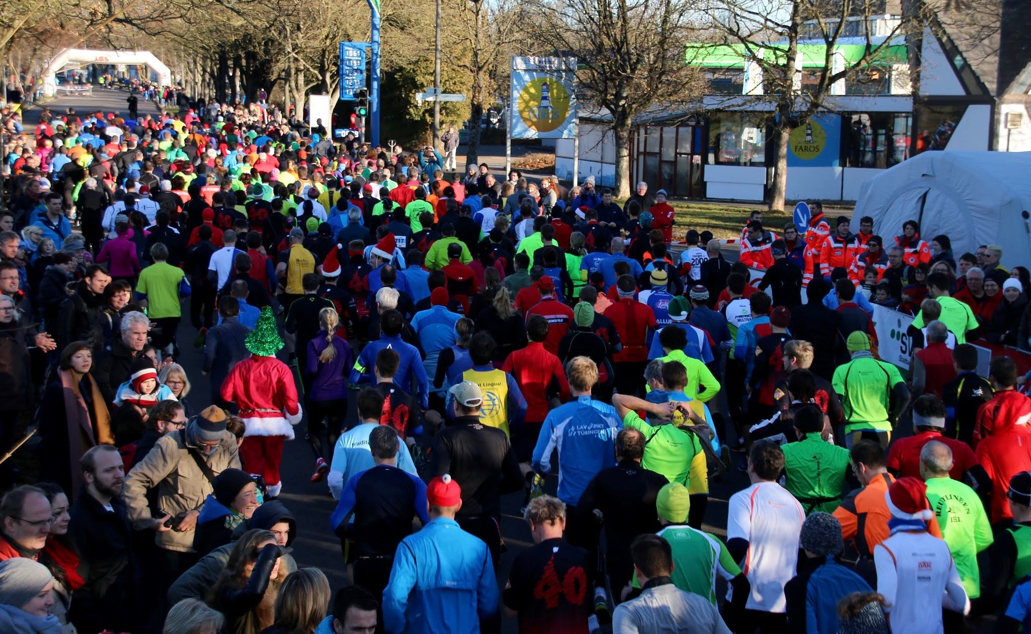 Zweite Startgruppe, 40. LBS-Nikolauslauf Tübingen